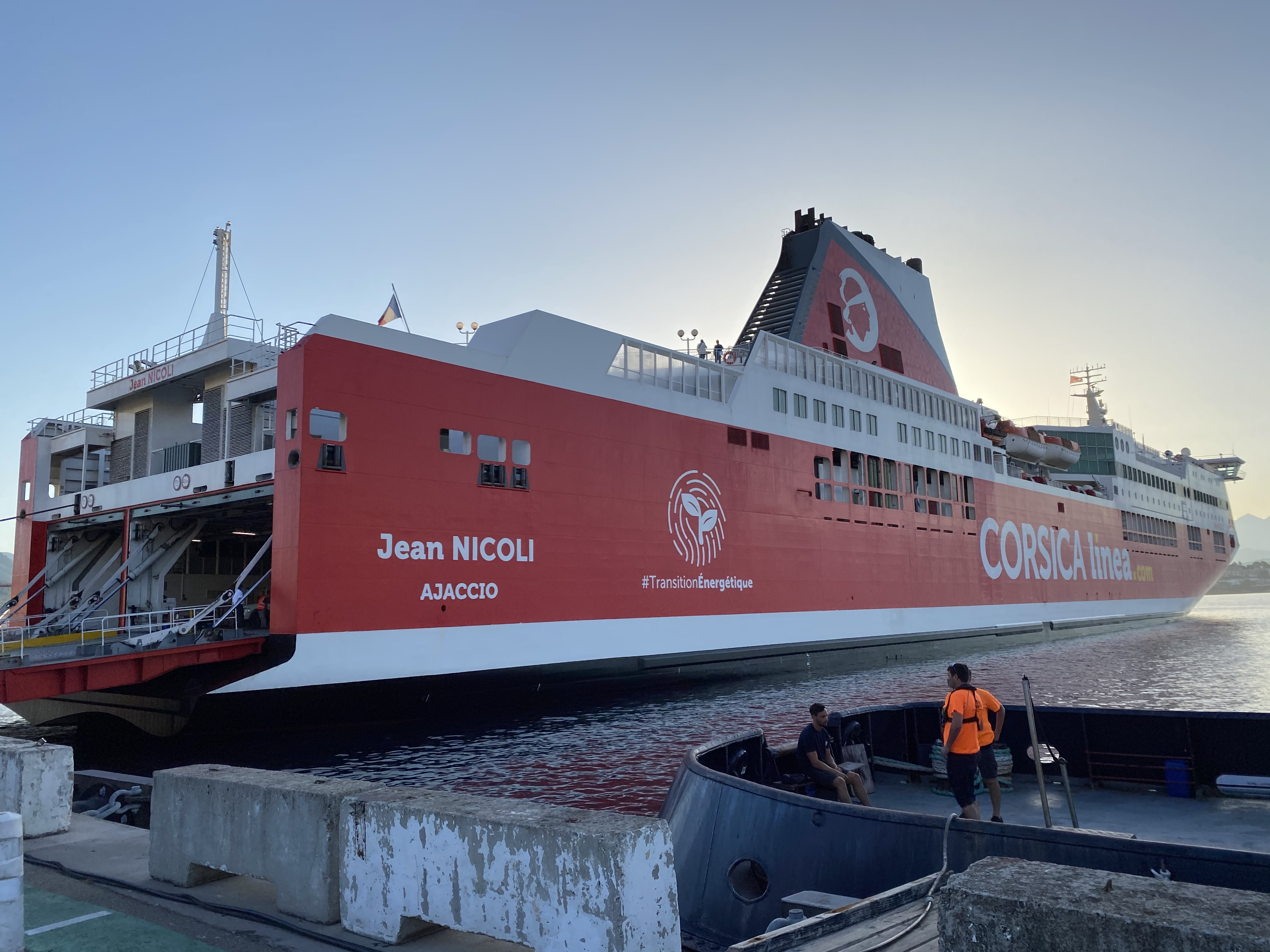 Le Jean Nicoli de la compagnie Corsica Linea à quai à Ajaccio.